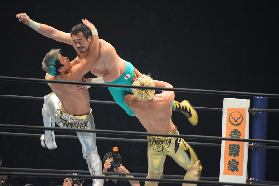 2017年11月5日 大阪府立体育会館「POWER STRUGGLE」 田口隆祐に3Kを仕掛けるロッポンギ3K（SHO & YOH）